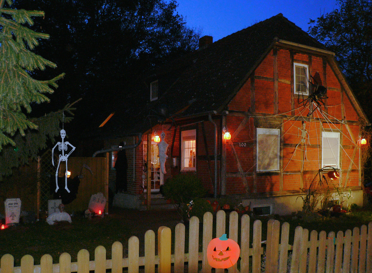 Halloween Haus in Deutschland mit dargestellten Gräbern im Garten, aufgehängtem Skelett, Spinne an der Hausfassade